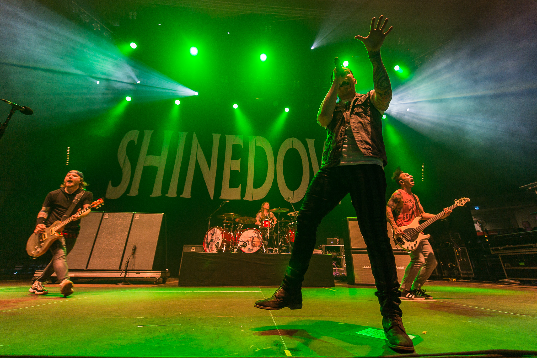 ARGO-Konzerte,Alternarena,Barry Kerch,Brent Smith,Eric Bass,Festival,Konzert,Livekonzert,Livemusik,Musik,RiP,Rock im Park 2016,Shinedown,Zach Myers